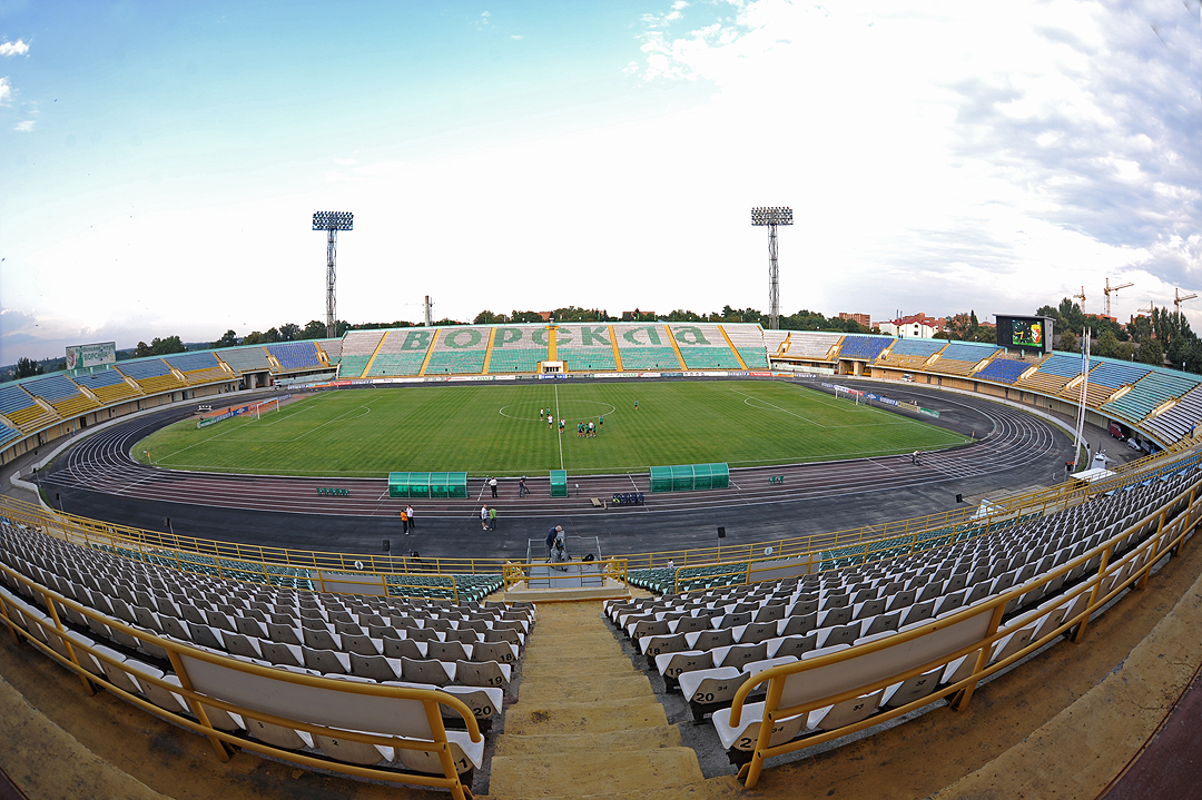 Домашняя арена Ворсклы